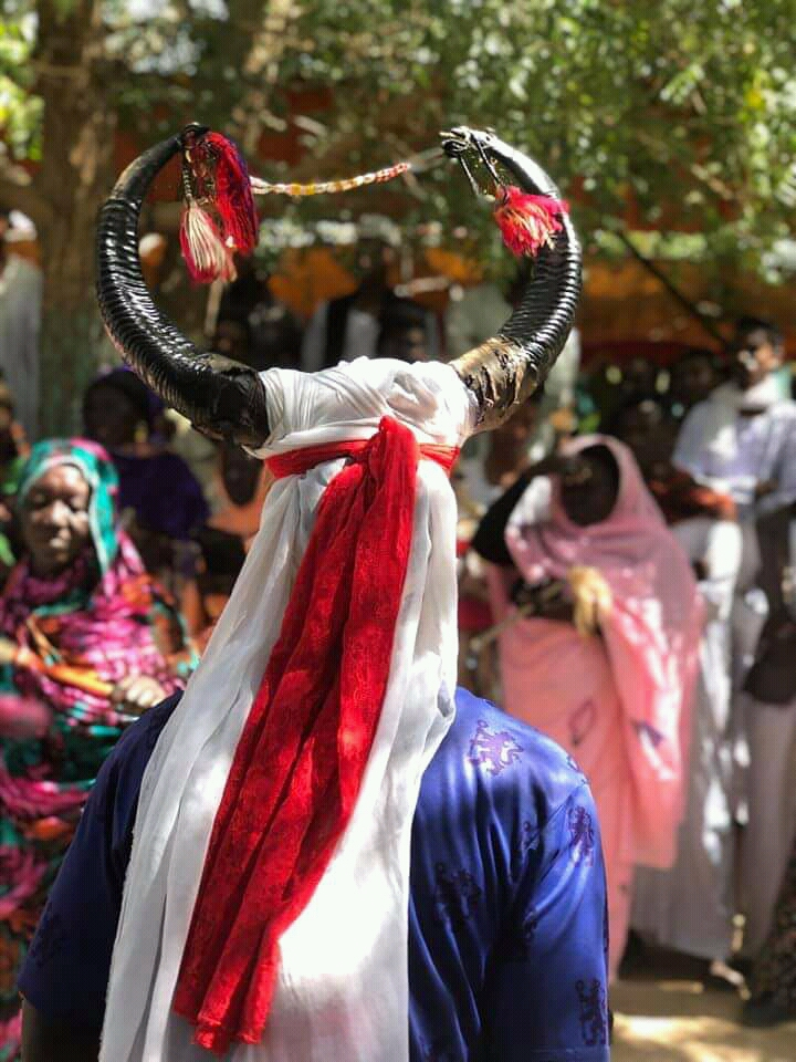 تراث شعبي في السودان معروف بالنقارة او الكرنق This photo has been taken in the country: Sudan